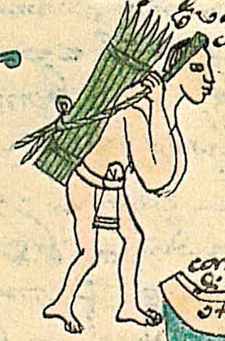 Mecapalero